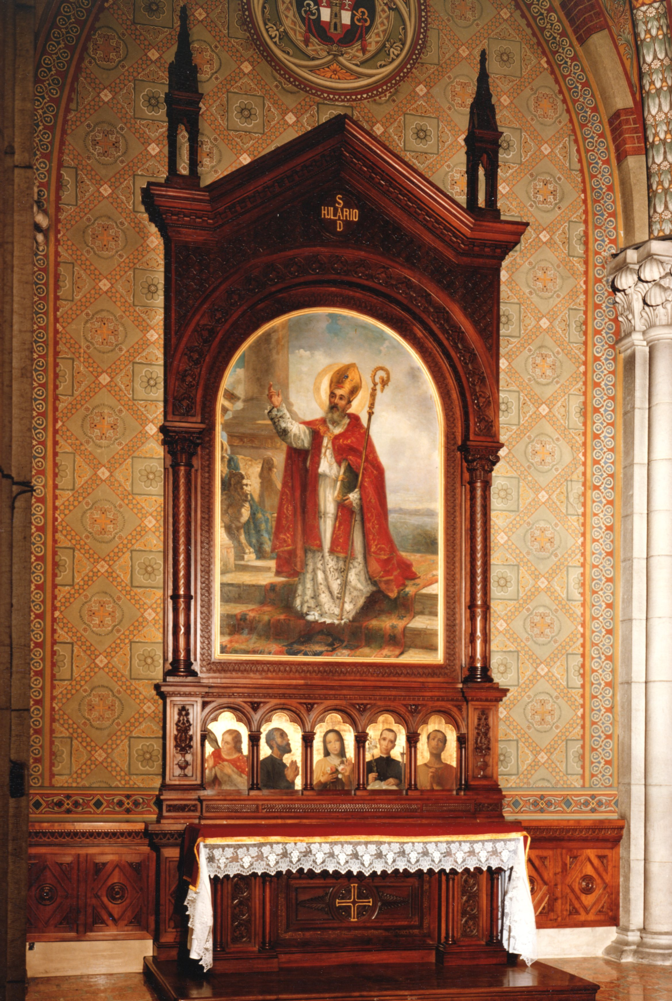 Altare progettato e realizzato da Ambrogio Fossati nel 1926 interamente in legno di noce intagliato. Nella parte bassa sono scolpiti cinque tempietti dove risiedono raffigurazioni di Santi. Questo Altare risiede nel Duomo di Lissone.